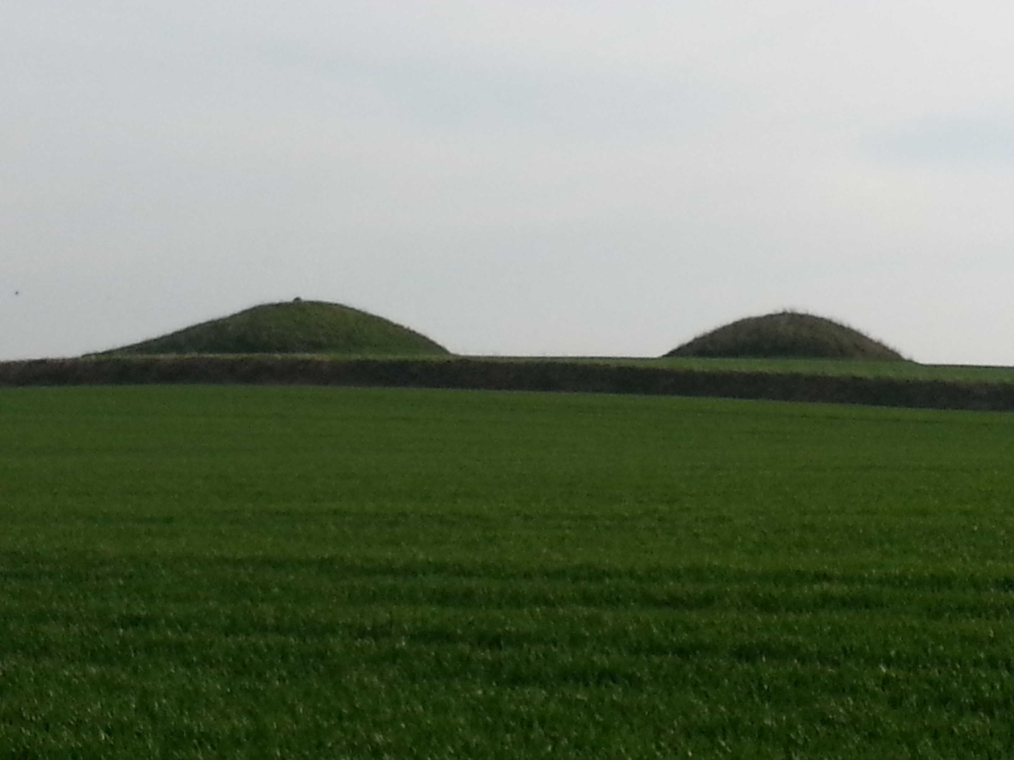 Den vänstra högen är St. Hans hög. Den högra St. Lucas hög